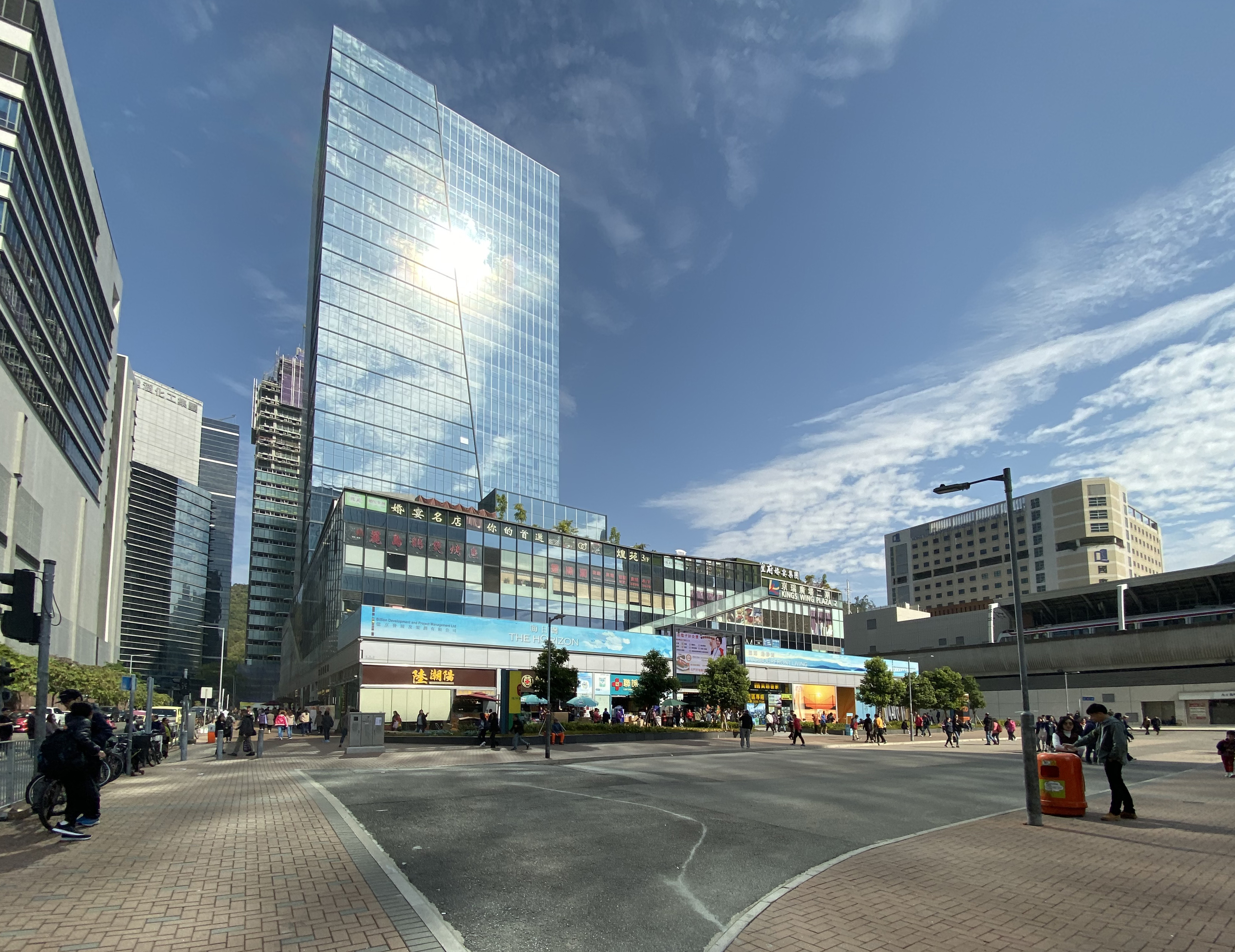 Kings Wing Plaza 2